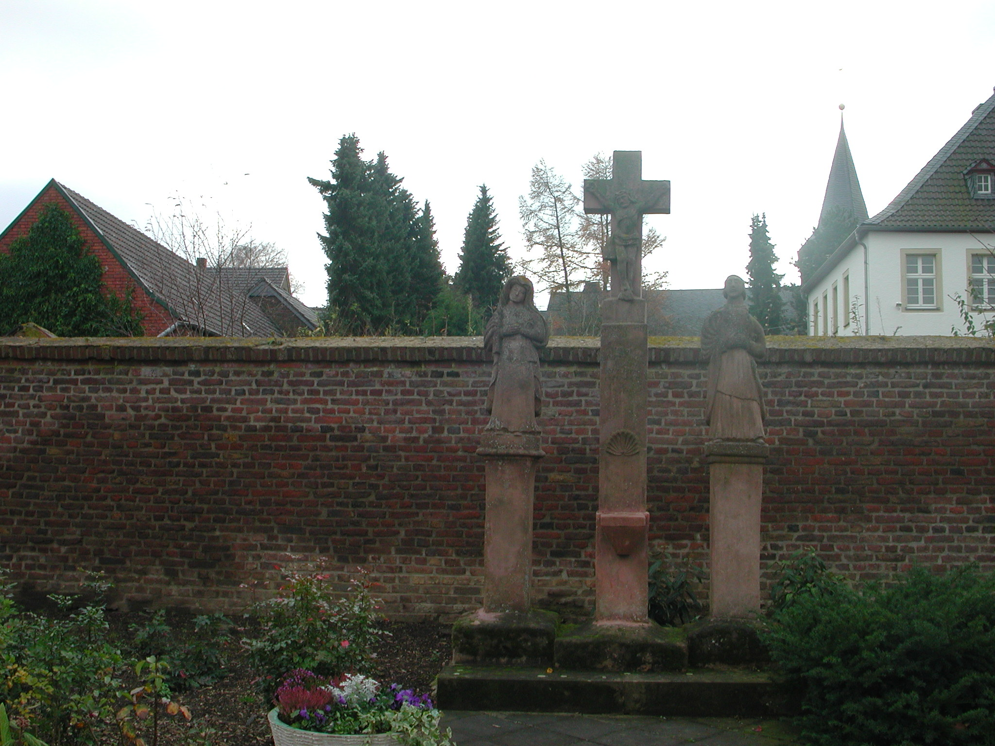 Das Denkmal an der Alfons-Keever-Straße in Pingsheim, Gemeinde Nörvenich